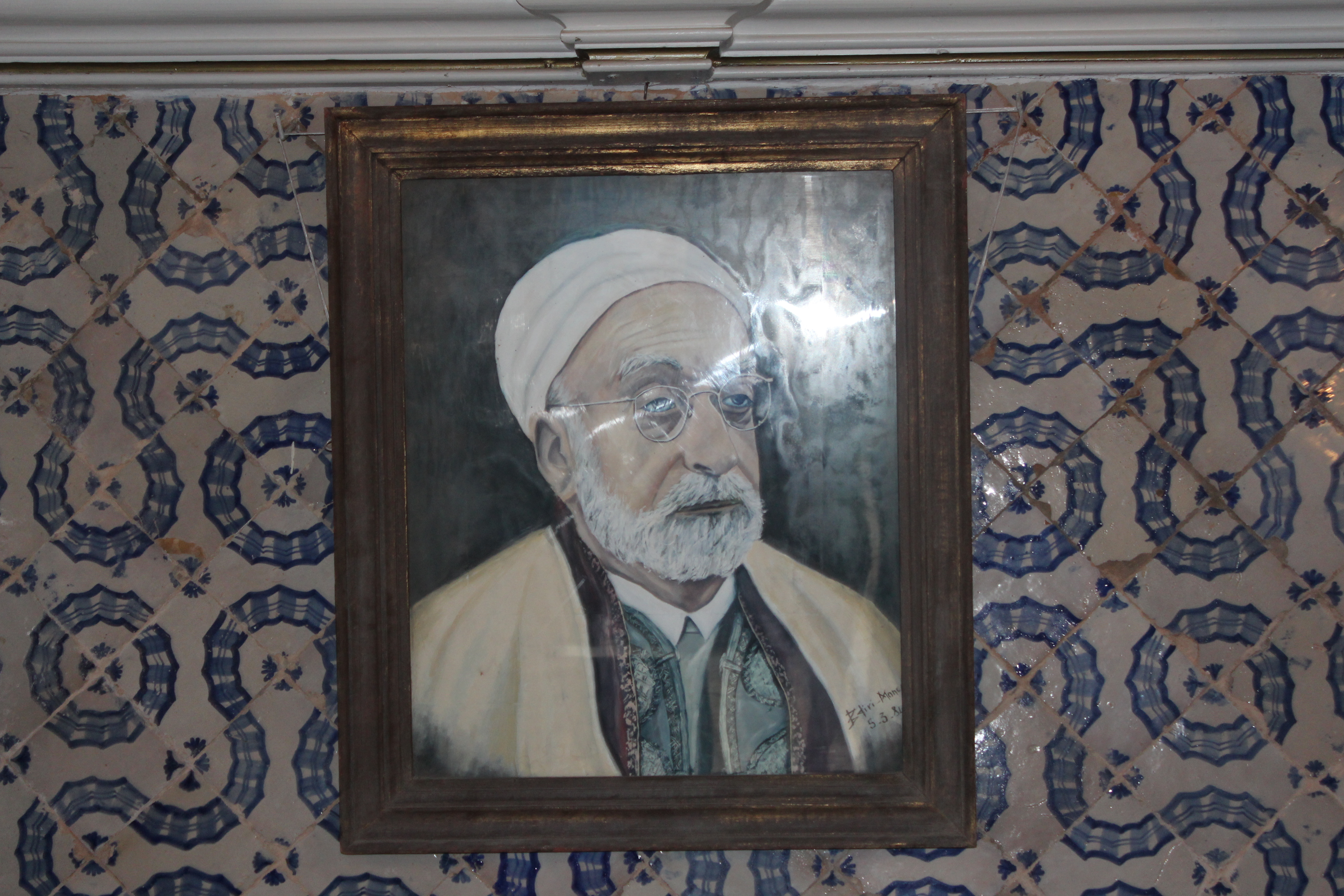 La médina de Tunis